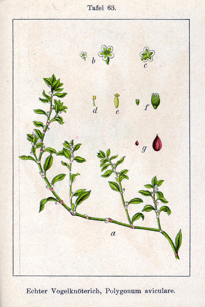 Polygonum aviculare L. (s. l.) Original Description Echter Vogelknöterich, Polygonum aviculare